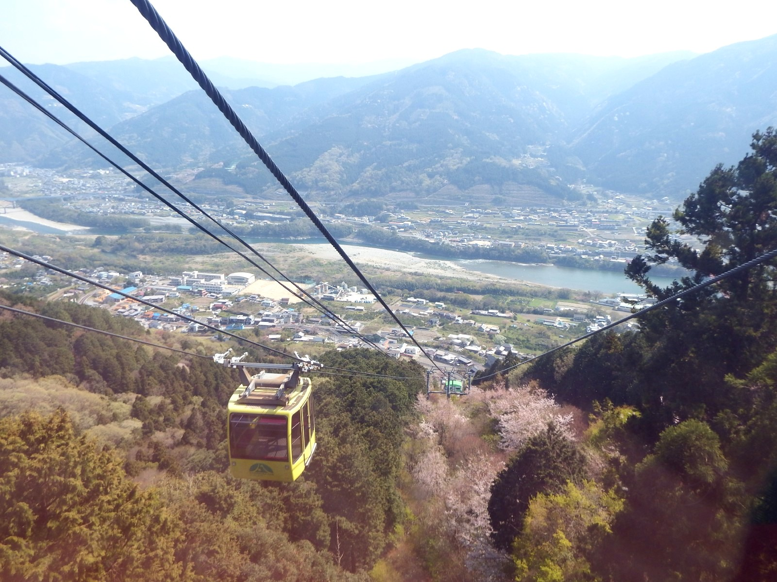 箸蔵ロープーウエイ